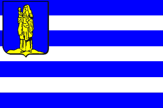 Vlag van de voormalige Zeeuwse gemeente Sint Annaland